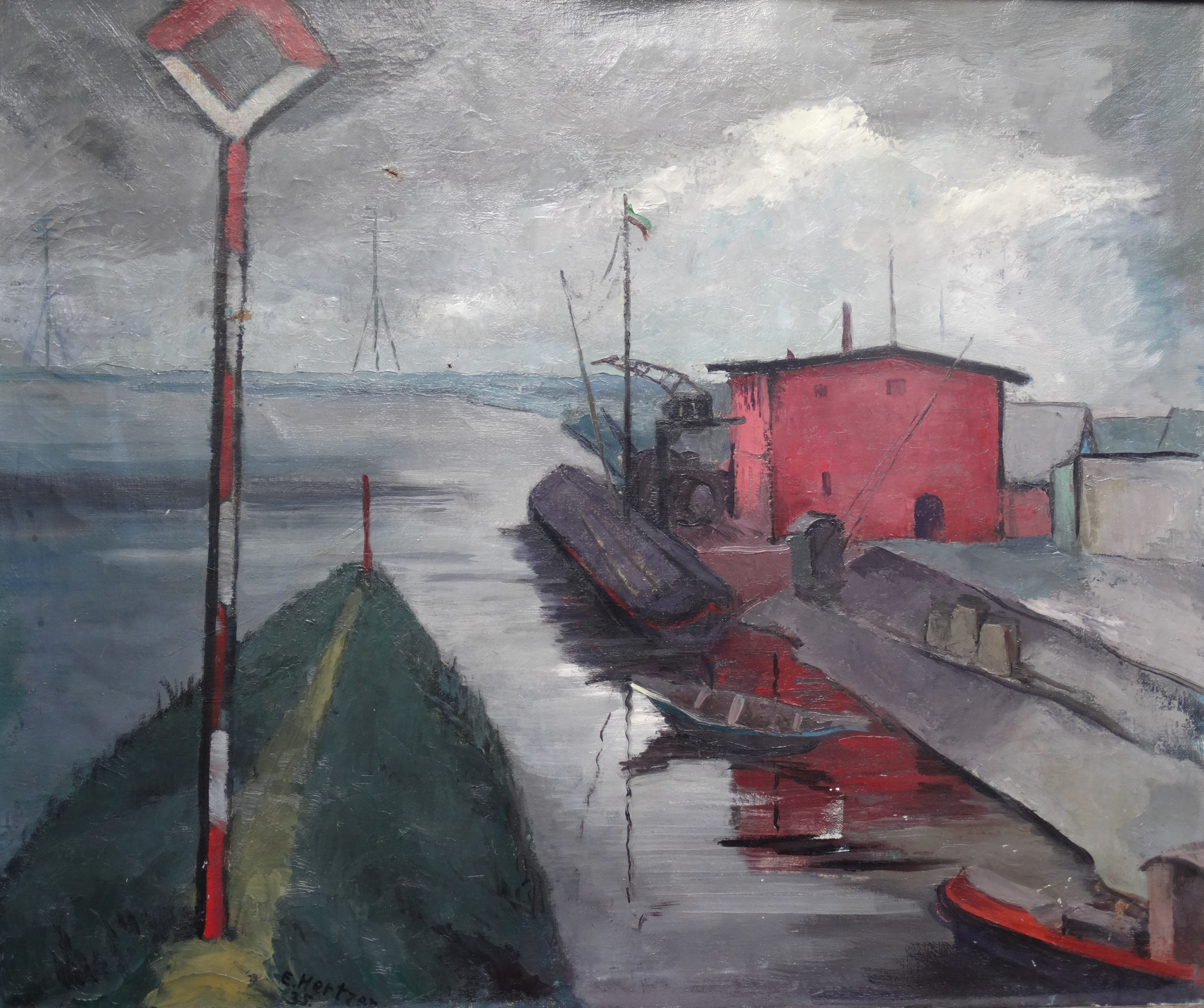 Den kleinen Elbehafen in Wittenberg-West hielt Else Hertzer bereits in den 1920er Jahren mit einem Aquarell fest. Die Einfahrt zum Hafen malte sie 1935 auf Leinwand. Sie wurde unter anderem im Sommer 1975 im Parkhaus im Englischen Garten Berlin gezeigt.